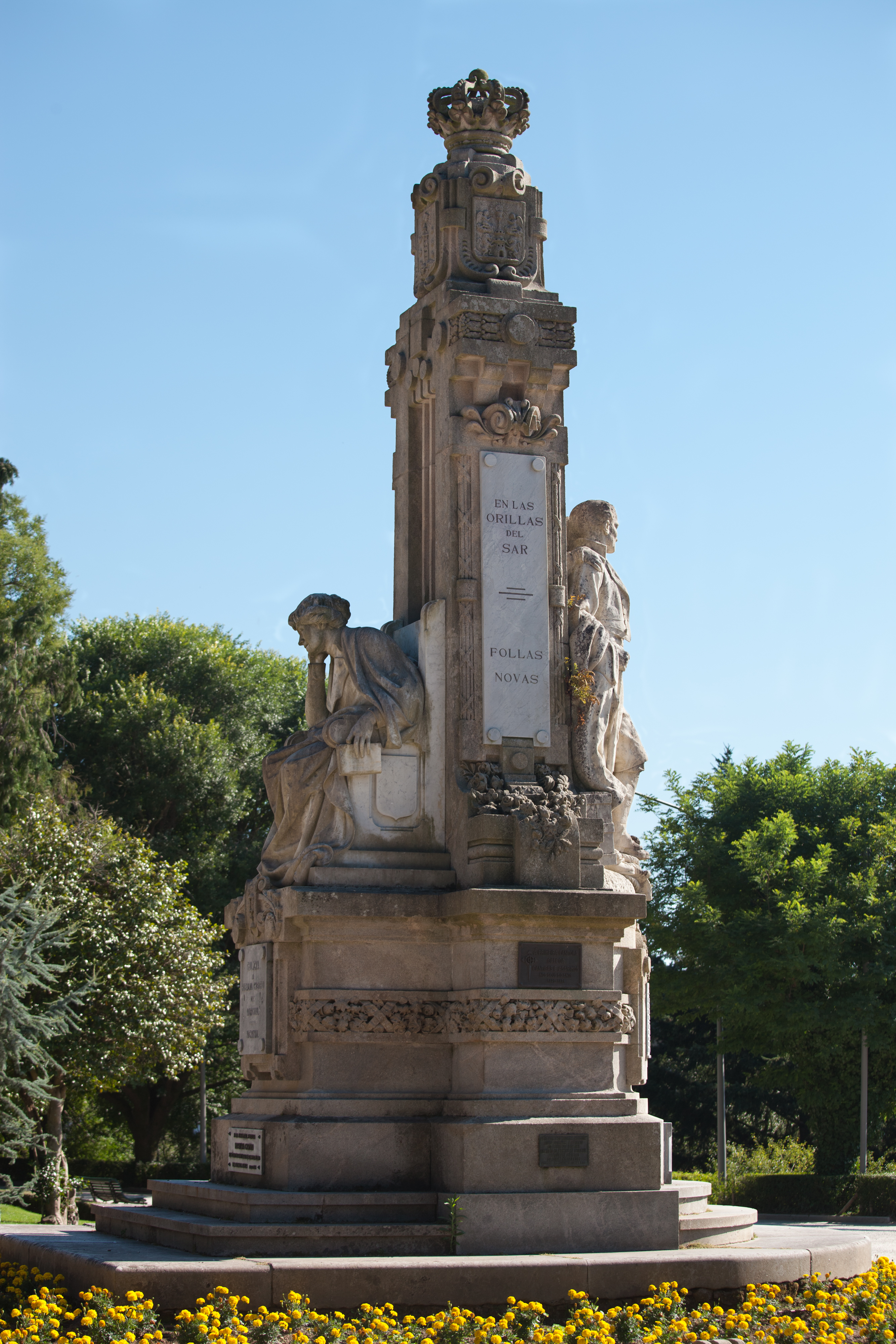 Escultura dedicada a Rosalía de Castro na Alameda. Santiago de Compostela, Galicia (Spain)